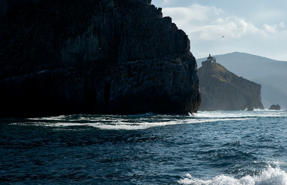 Aketxa and Gaztelugatxe. Aketxa eta Gaztelugatxeko Doniene atzealdean."?"